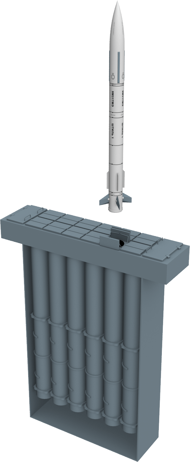 ЗРК Штиль-1